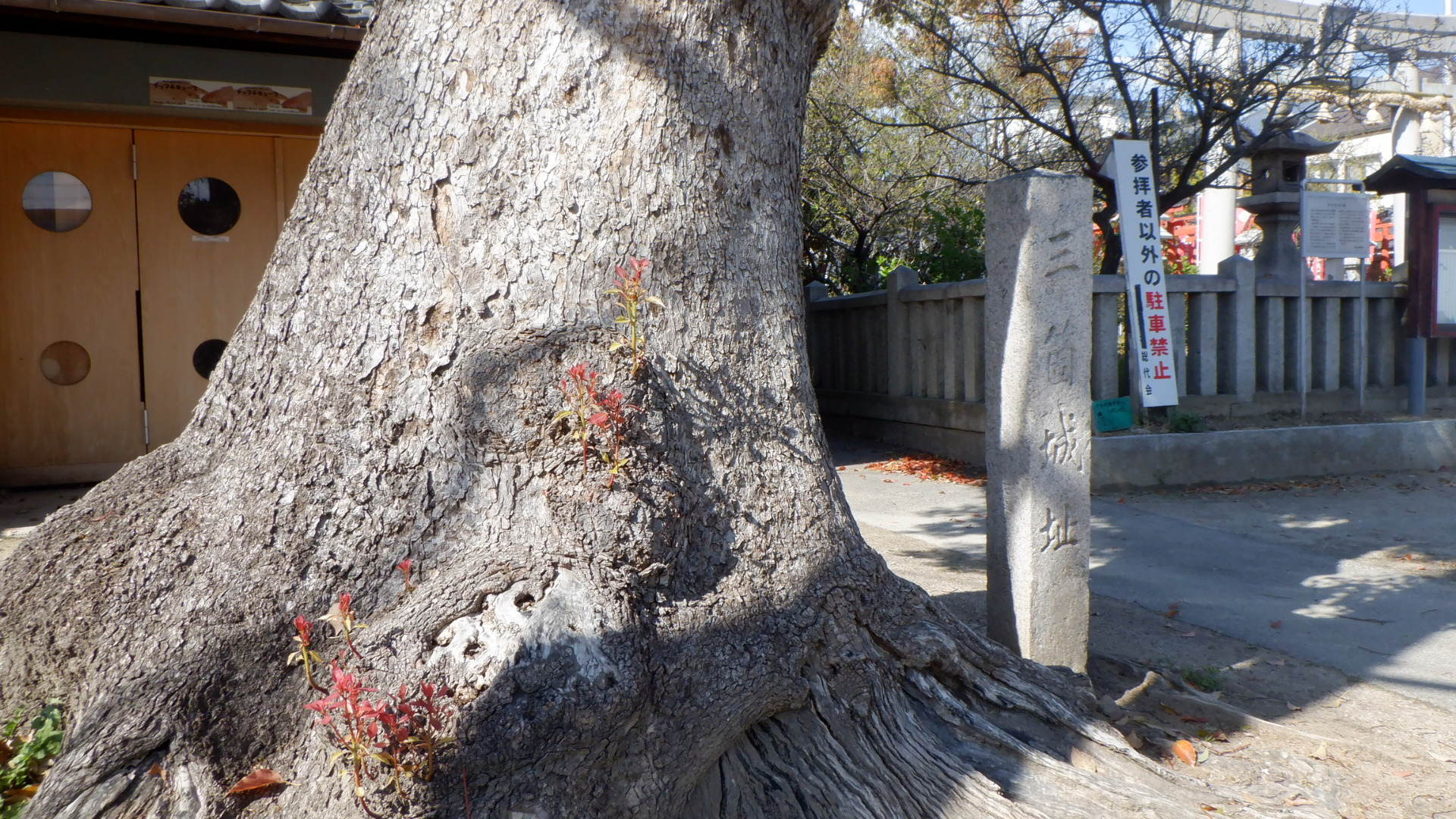 三箇城址石碑、大正8年建立